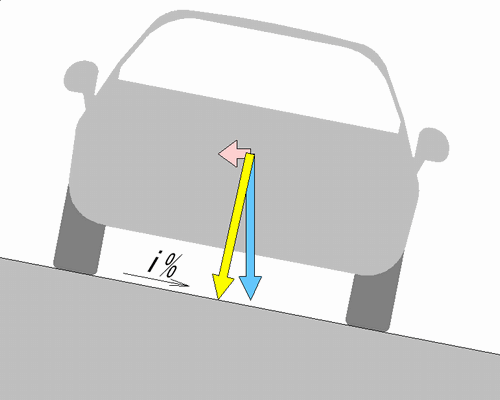 カーブ区間におけるカントの働き。カントのある場合。ikaxerが作成。